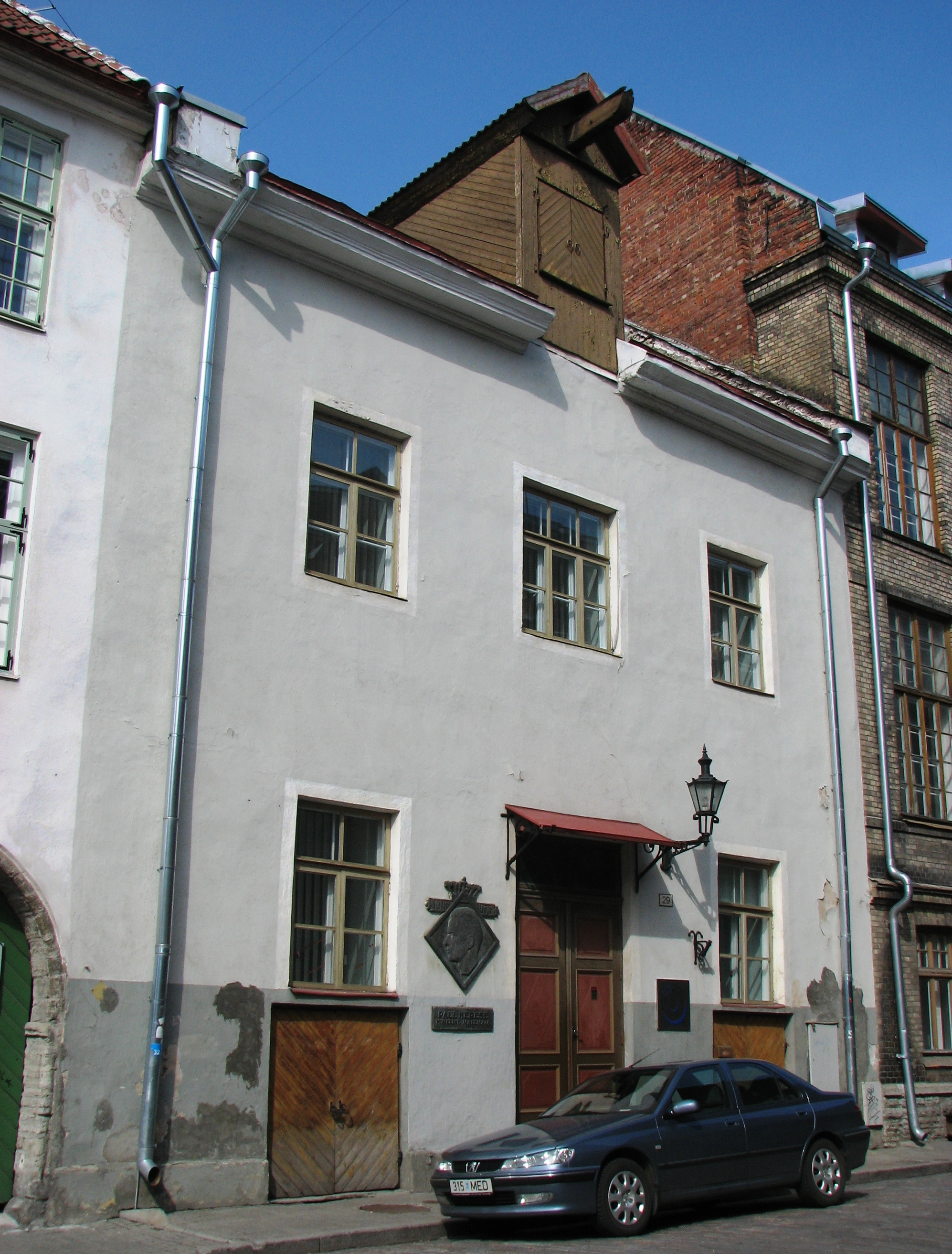 Paul Kerese nimeline Malemaja on maja Tallinnas aadressil Vene tänav 29.